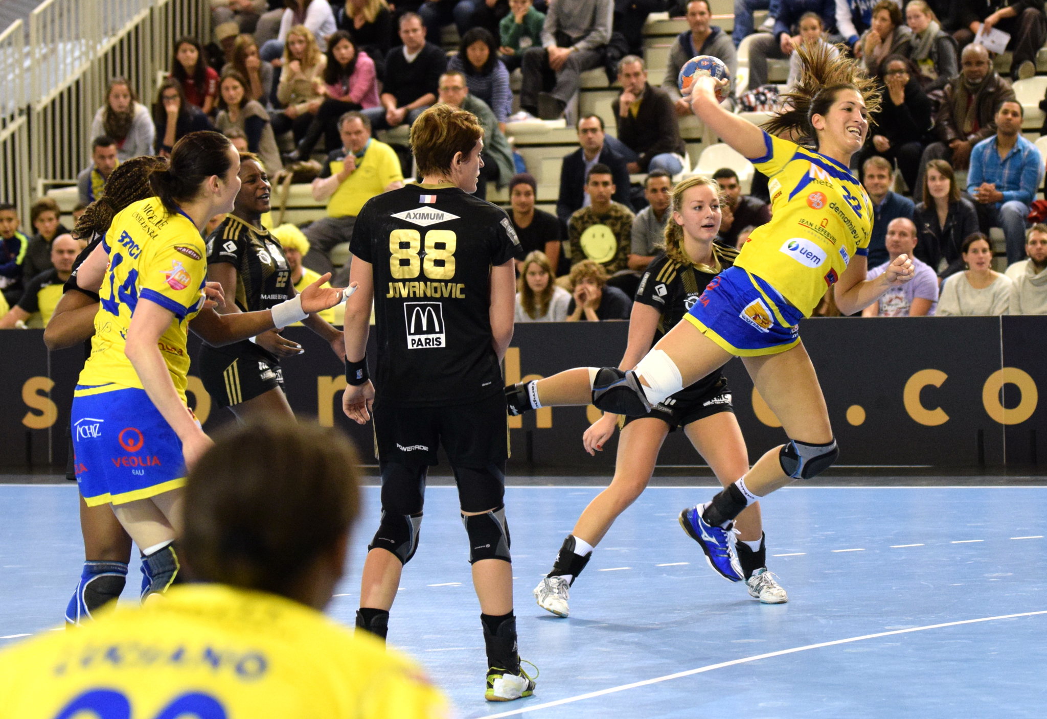 Lara González Ortega , lors de la rencontre de la 10e journée en Issy Paris Hand et Metz Handball, le 12 novembre 2014. Au stade Robert Carpentier à Issy les moulineaux.